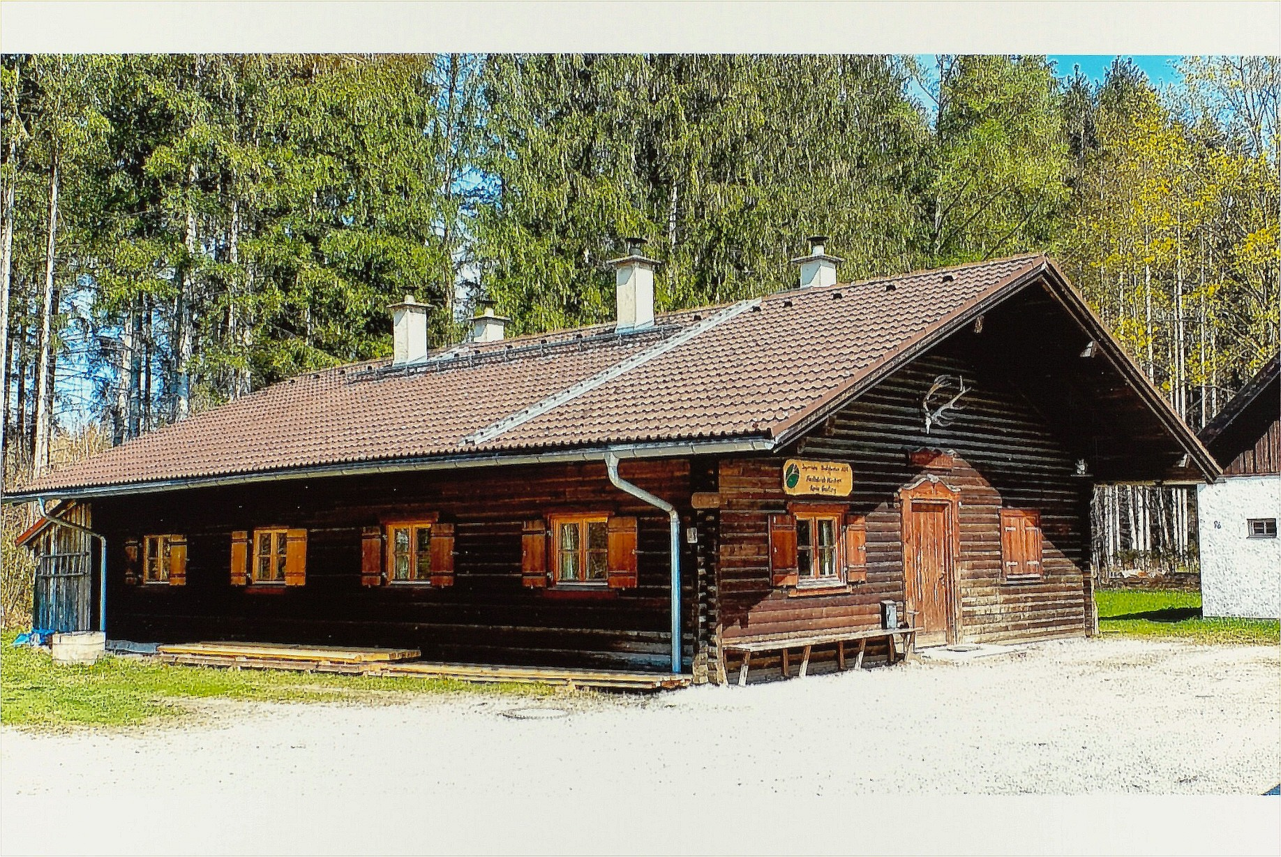 Kreuzlinger Forst (Krailling), Hubertushütte am versetzten Kreuzungsbreich der Straßen Gauting-Germering und Krailling-Pentenried.